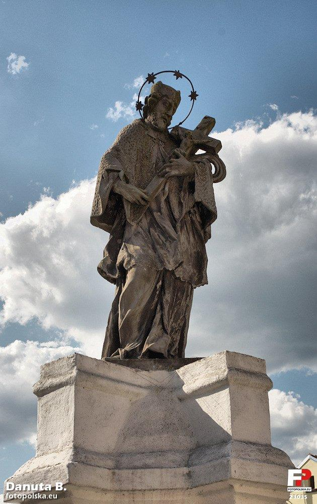 Całkiem kompletna figura mojego ulubionego świętego.